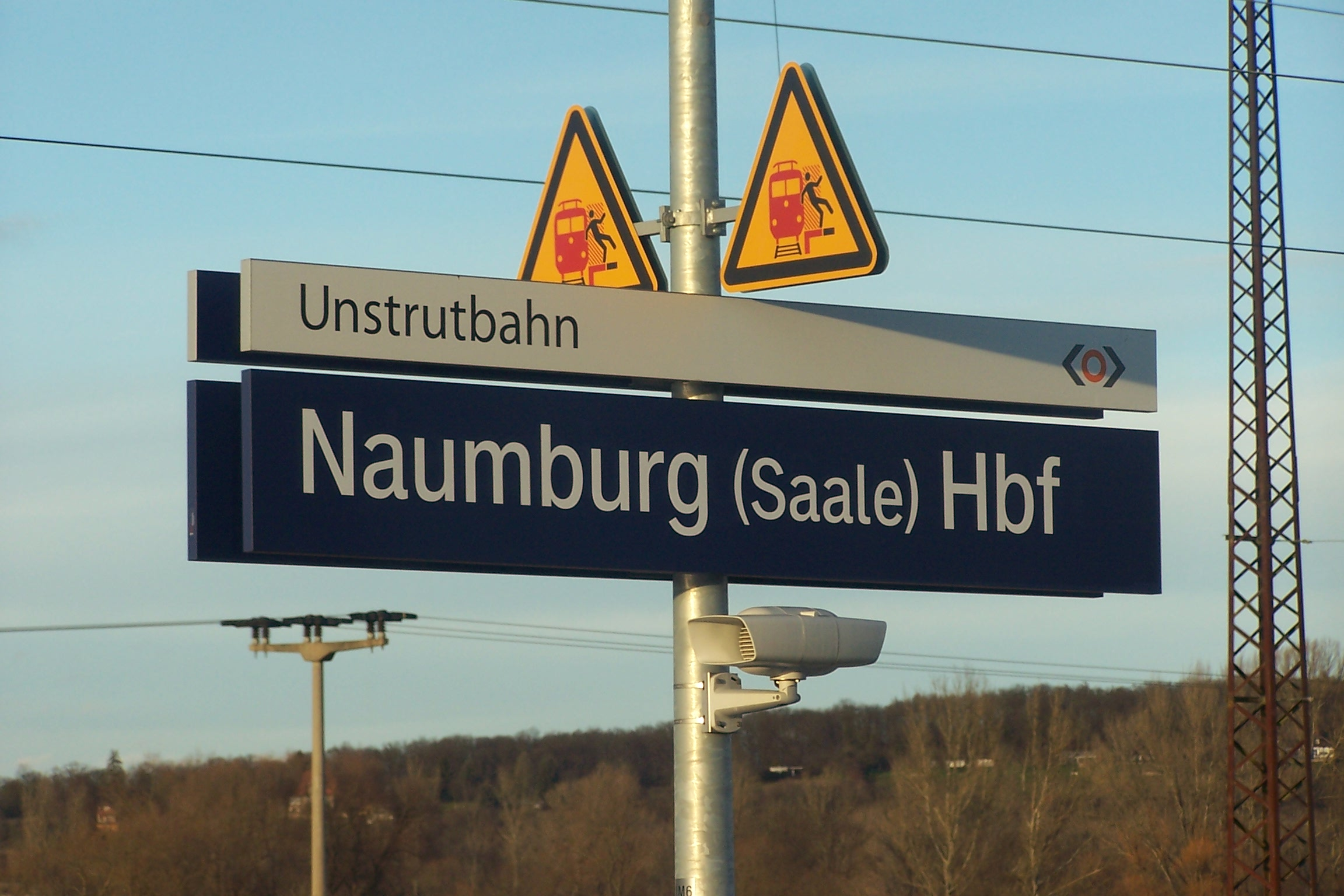 Stationsschild von Naumburg (Saale) Hbf.